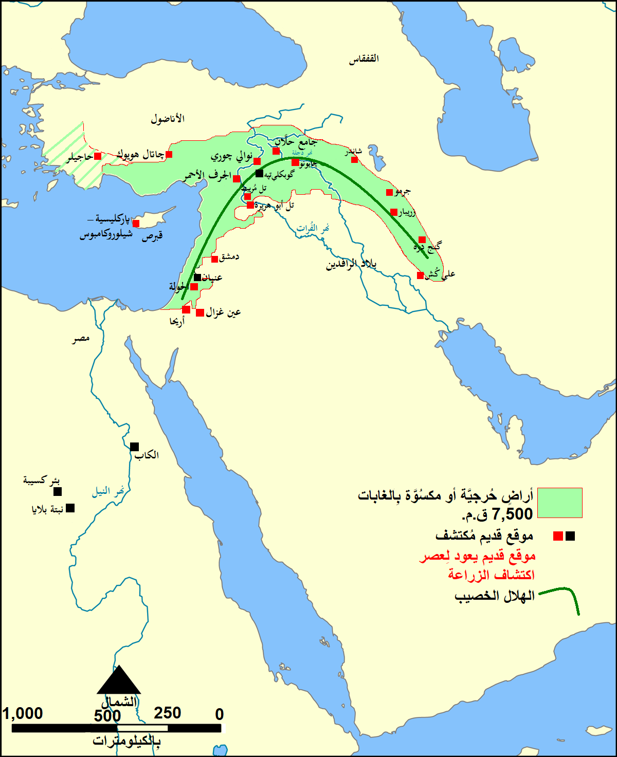 خريطة الهلال الخصيب حوالي سنة 7500 ق.م.